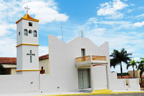 IGREJA MATRIZ DE BOA SAÚDE RN